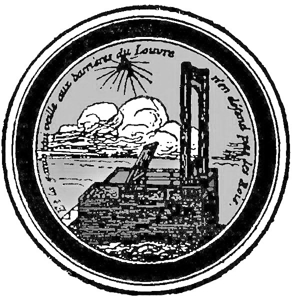 Tabatière de la fin du XVIIIe siècle, faite après la mort du Roi. En carton verni, surmonté d'une estampe colorée avec une guillotine et un bonnet phrygien. Dans les nuages, une légende : "Et la garde qui veille aux barrières du Louvre, n'en défend pas les rois". (inspirée de Malherbe).